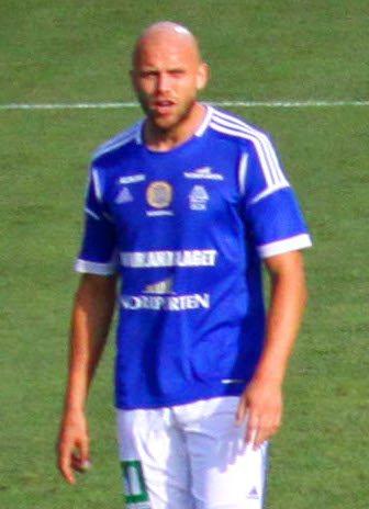 Stefan Ålander